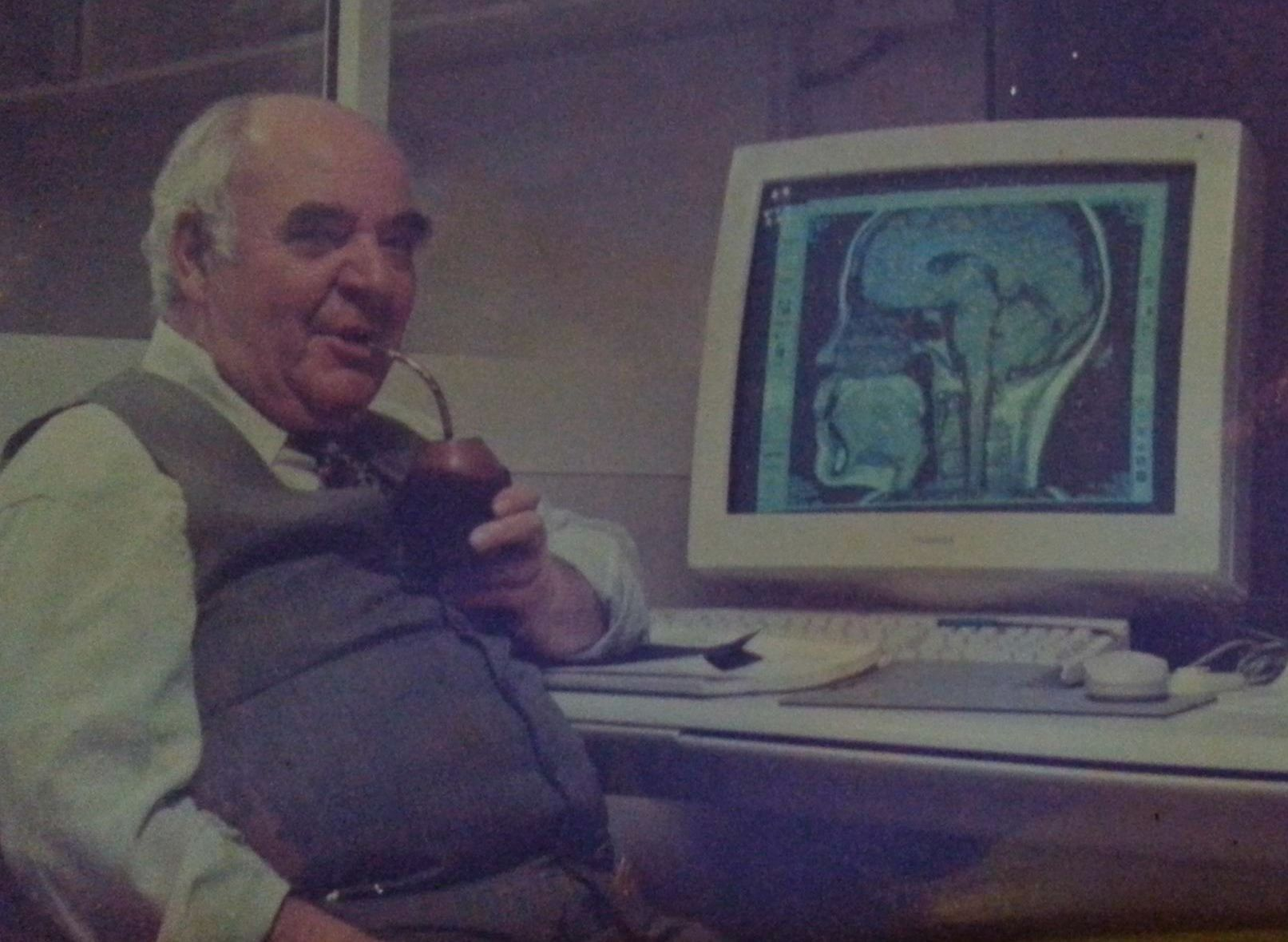 Dr. Sardagna (2001)